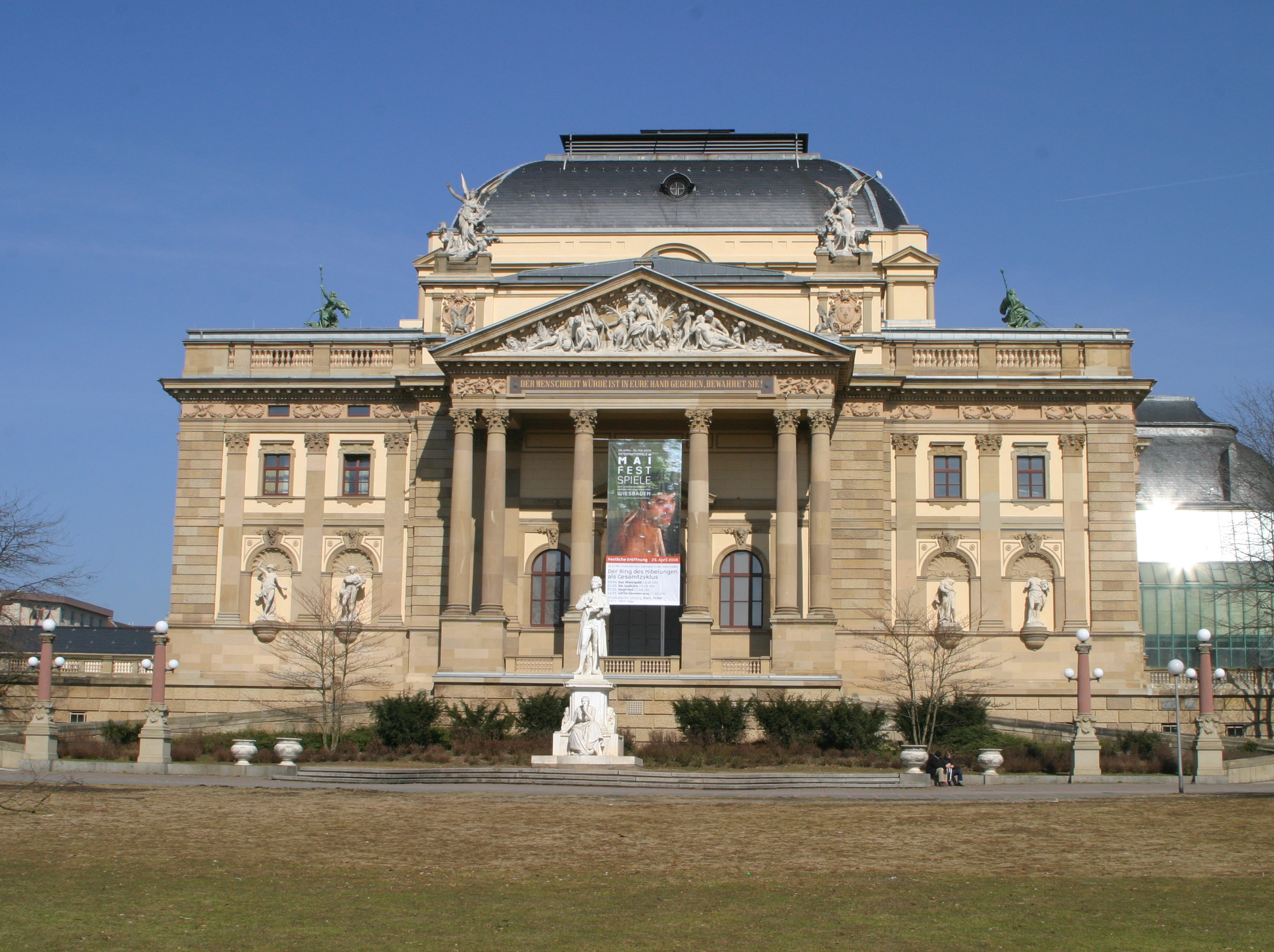 Wiesbaden, Hessisches Staatstheater. Vier Nischenfiguren von Theodor Bausch.